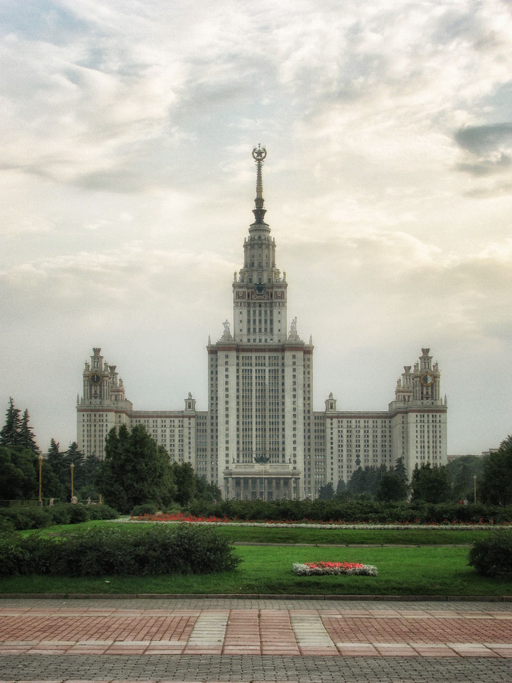 Главное здание МГУ, Москва.